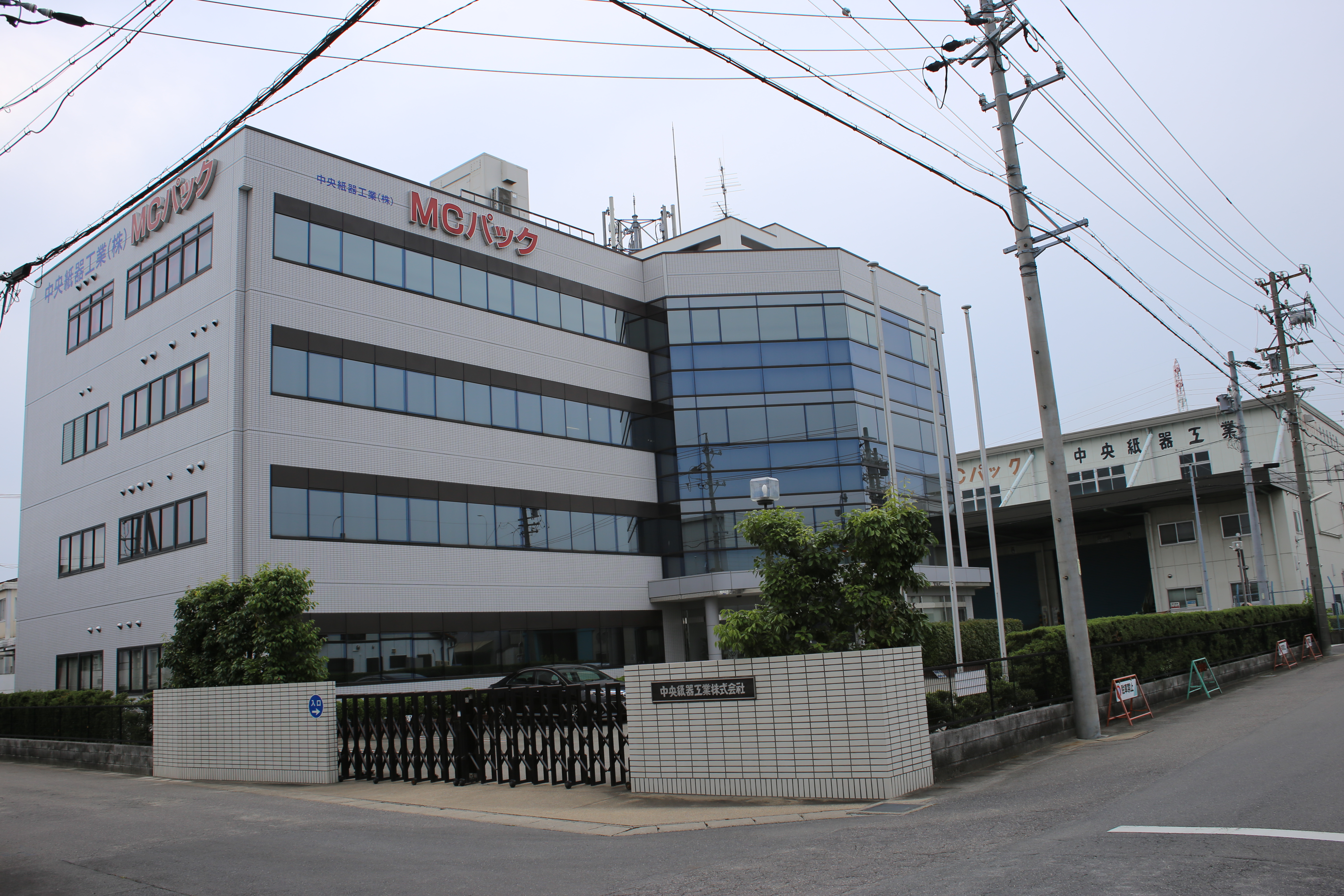 愛知県清須市春日宮重町の中央紙器工業本社を東側公道南側より撮影